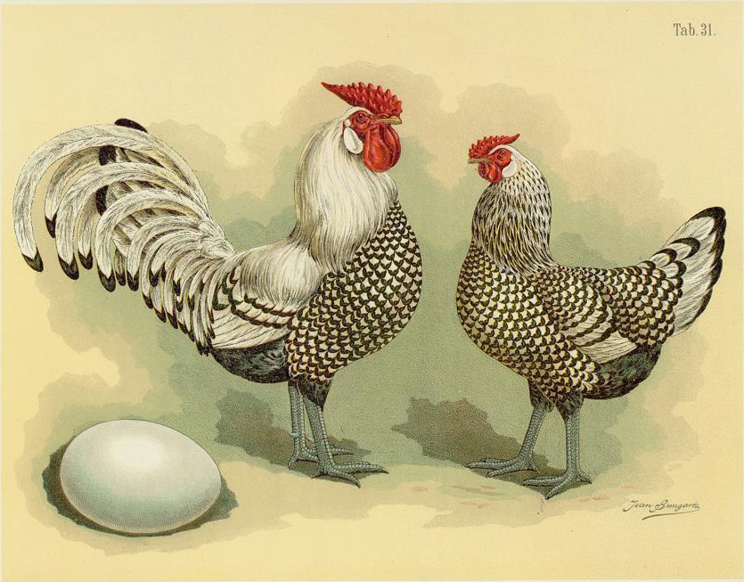 Hamburger-Huhn. Gallus dom. hamburgieus. Hamburghs. Poule de Hamburg.